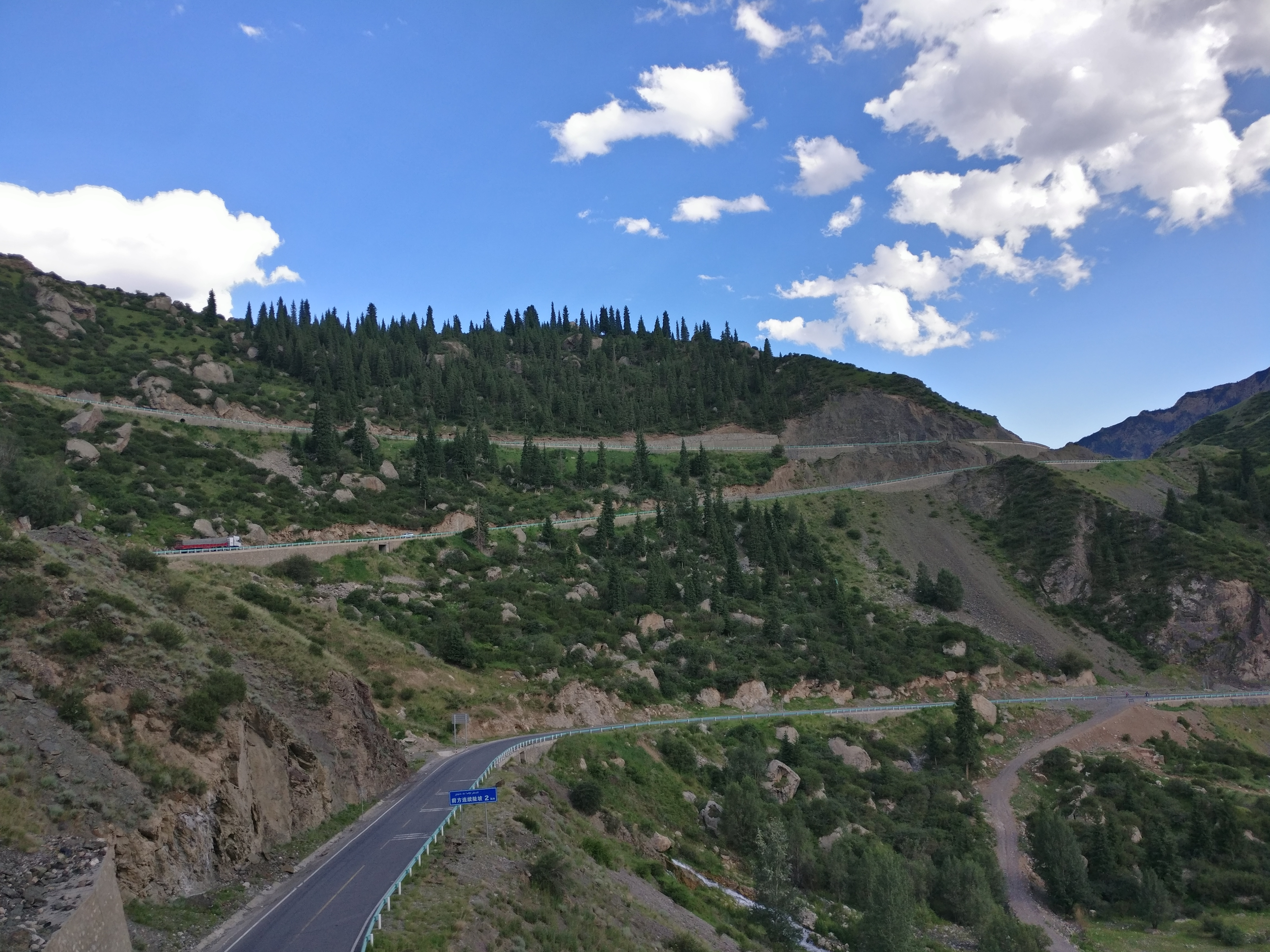 国道217独库公路段，约960公里处